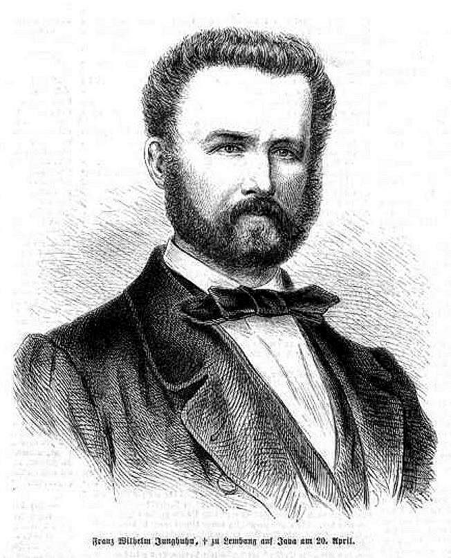 Junghuhn. Porträt aus: Illustrirte Zeitung